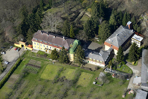 Verőce, Migazzi-kastély légi fotó